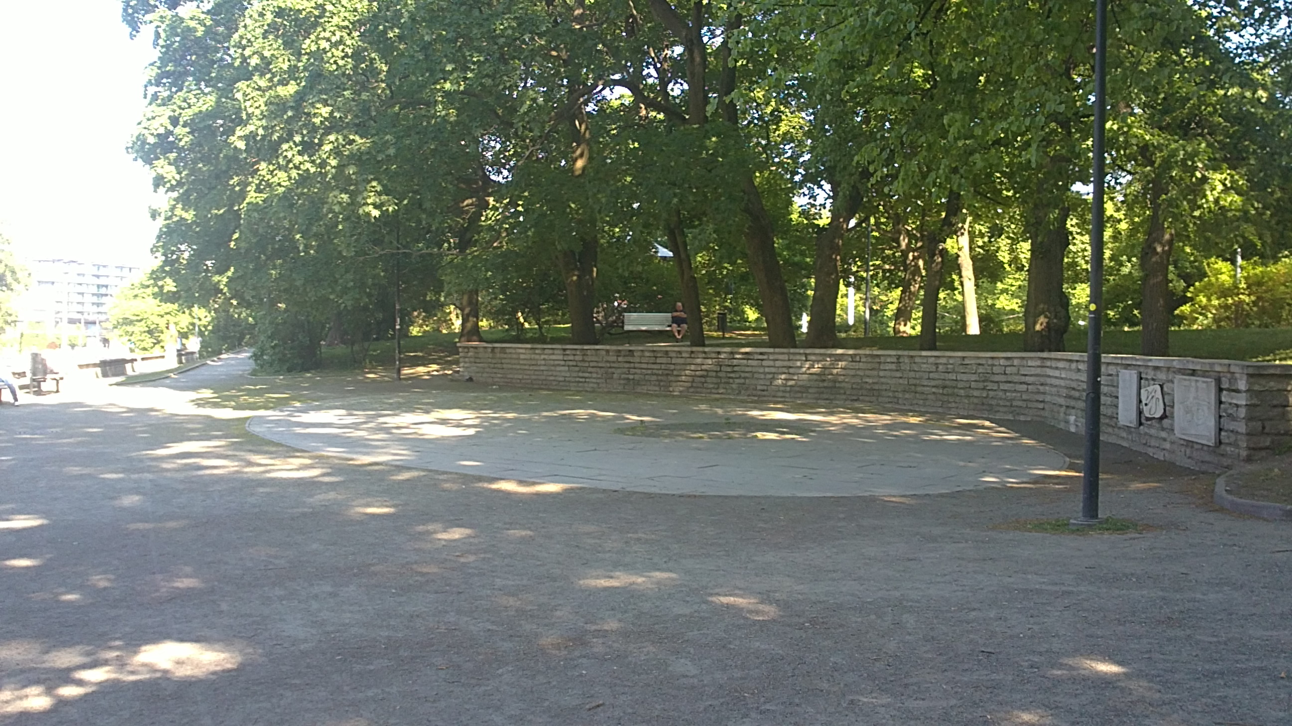 Tallinna Virumäe suveteatri plats